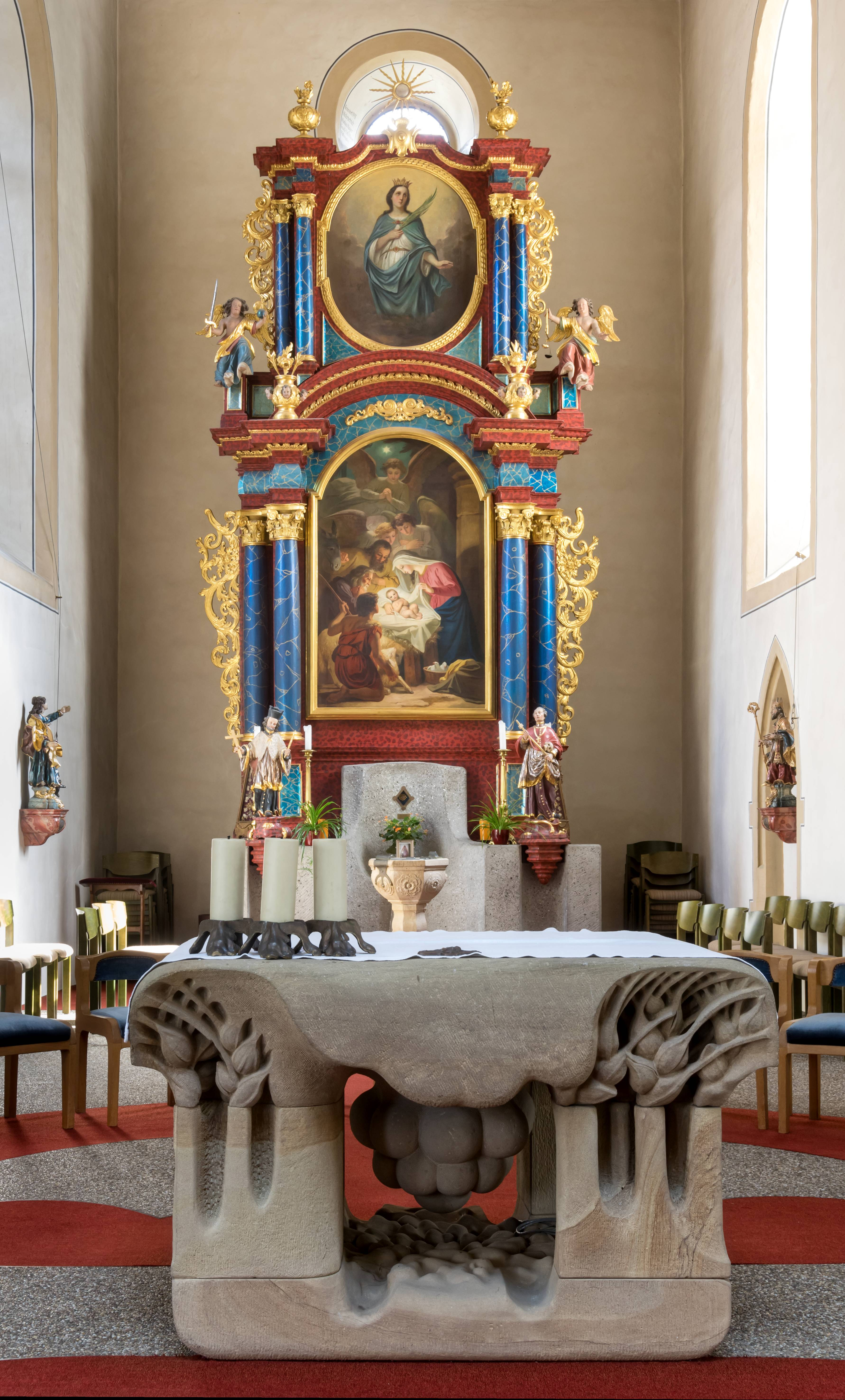 Bilder von St. Columba. in Pfaffenweiler